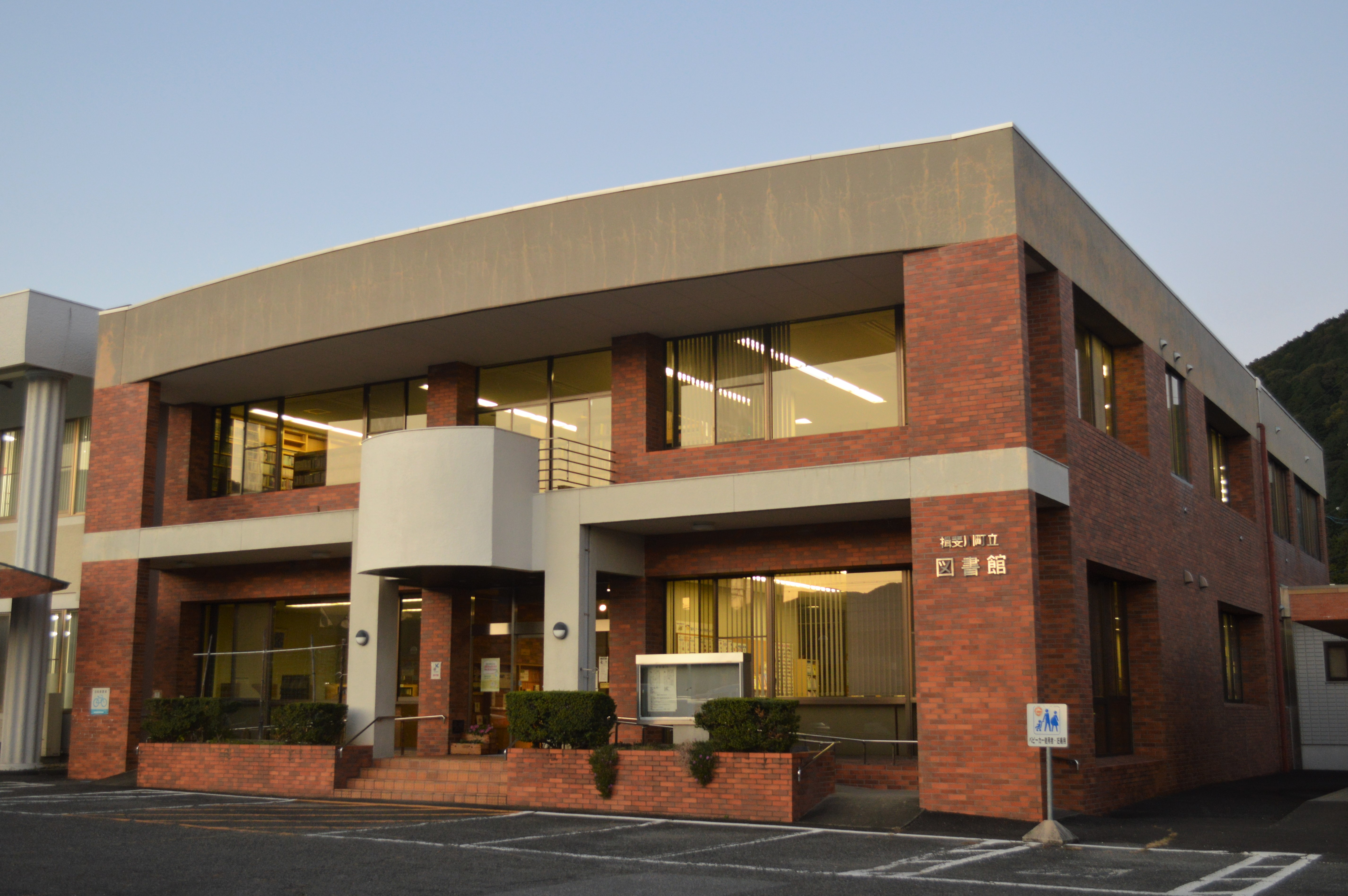 岐阜県揖斐郡揖斐川町にある揖斐川町立図書館。